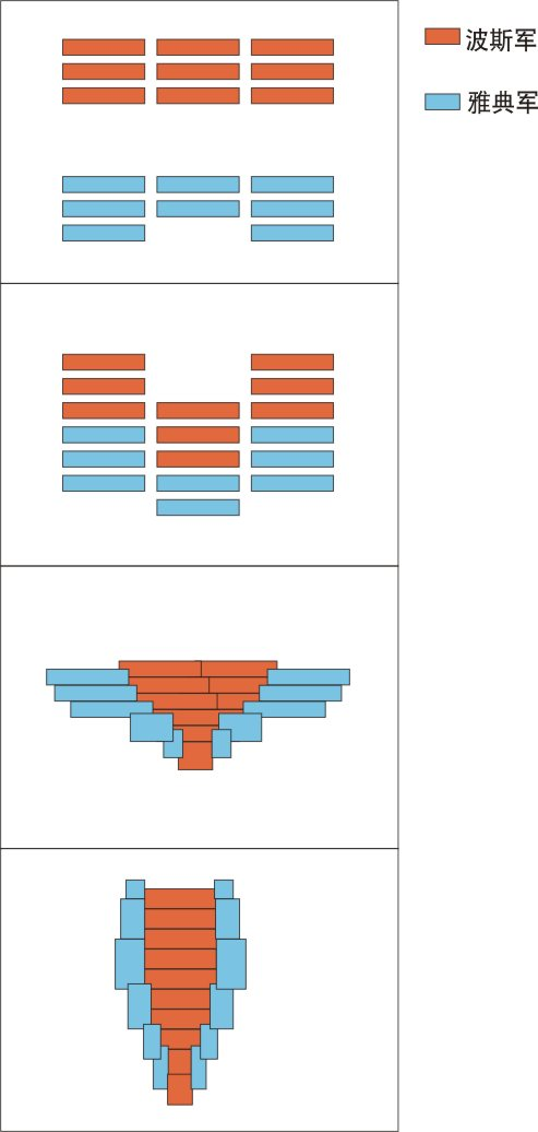 马拉松战役雅典与波斯军战斗模拟图 图片来源：LiYan制作 绘制软件：coreldraw 图片连接：马拉松战役